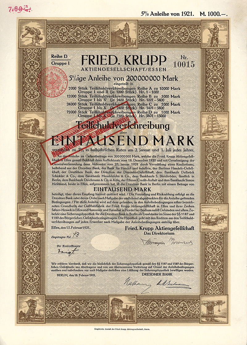 5%-Teilschuldverschreibung über 1000 Mark der Fried. Krupp AG vom 15. Februar 1921